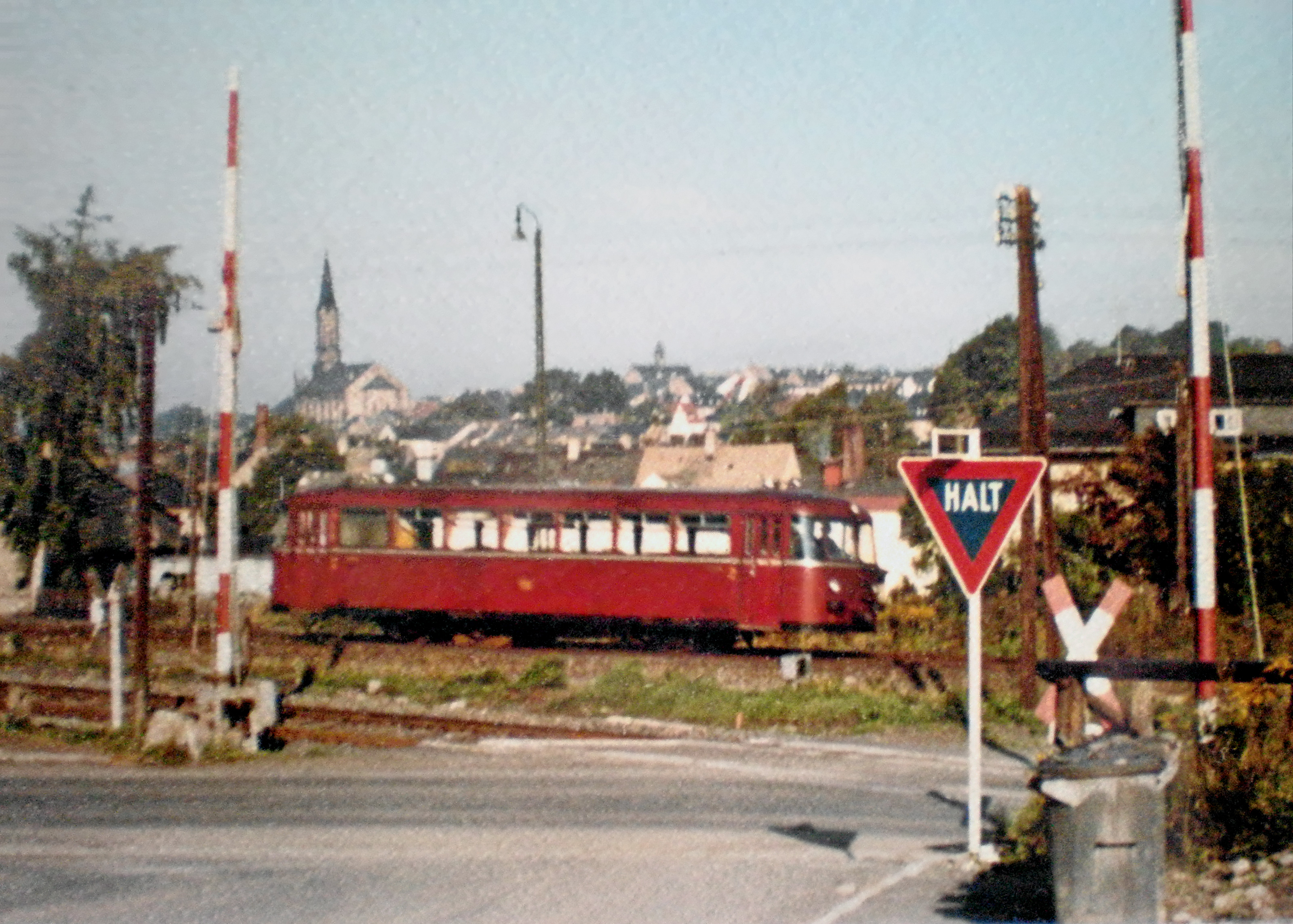 Bahnübergang an der Kirchenlamitzer Straße bei Münchberg mit einem VT 95 im Hintergrund auf der Strecke Richtung Hof.